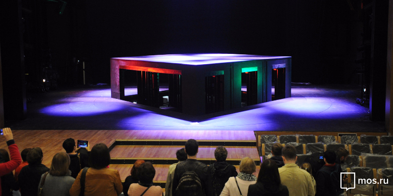 Сцена в театре Табакова